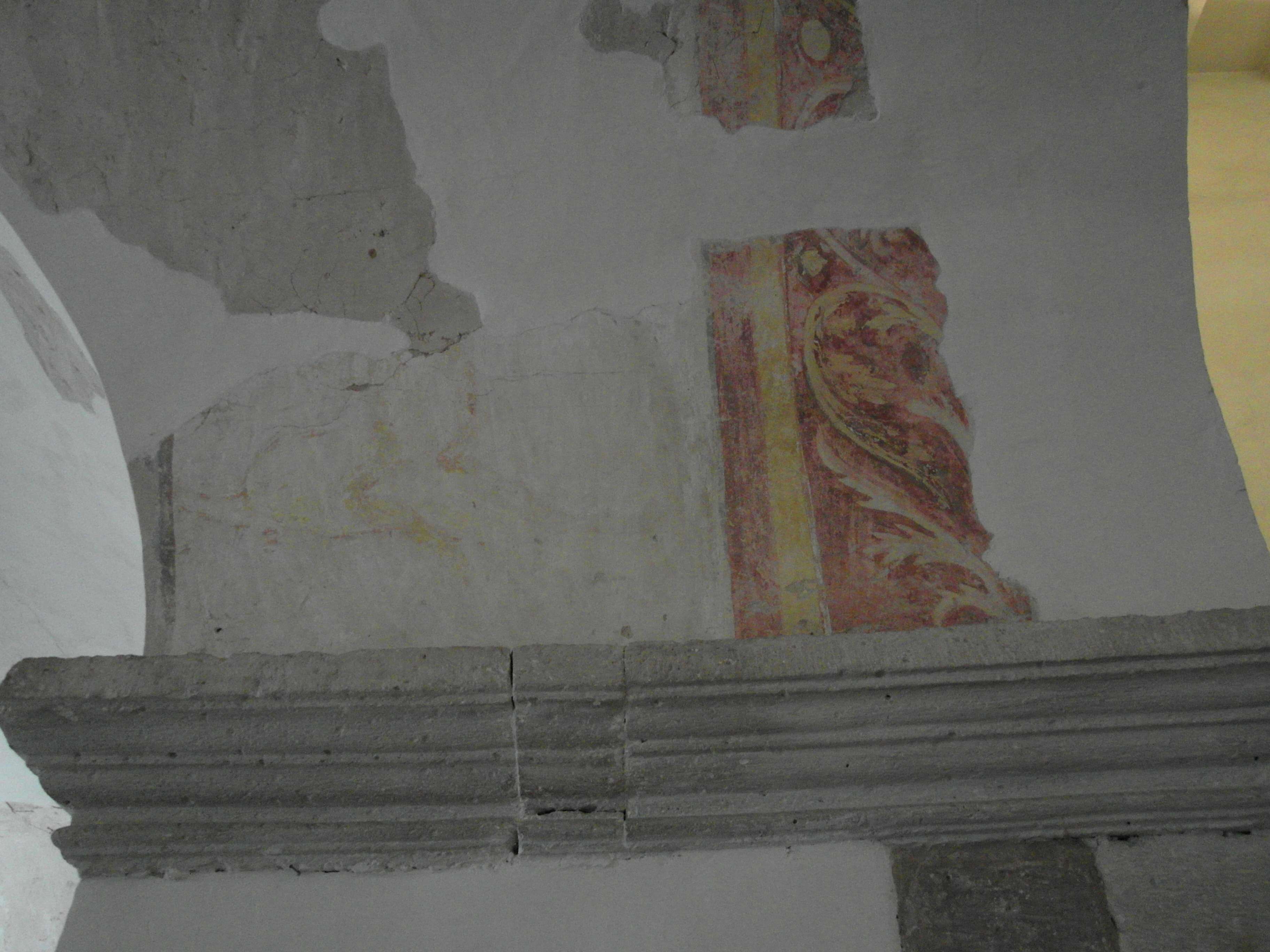 Wandmalerei (Delphin und Akanthusfries) im westlichen Gewölbeansatz im Westwerk der Abteikirche von Corvey bei Höxter.